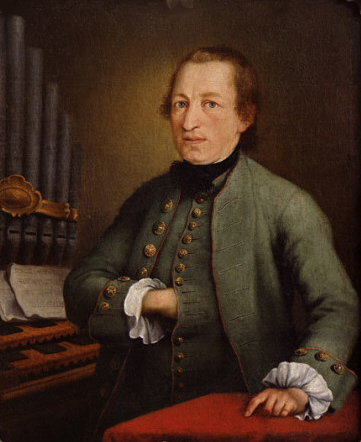 detail